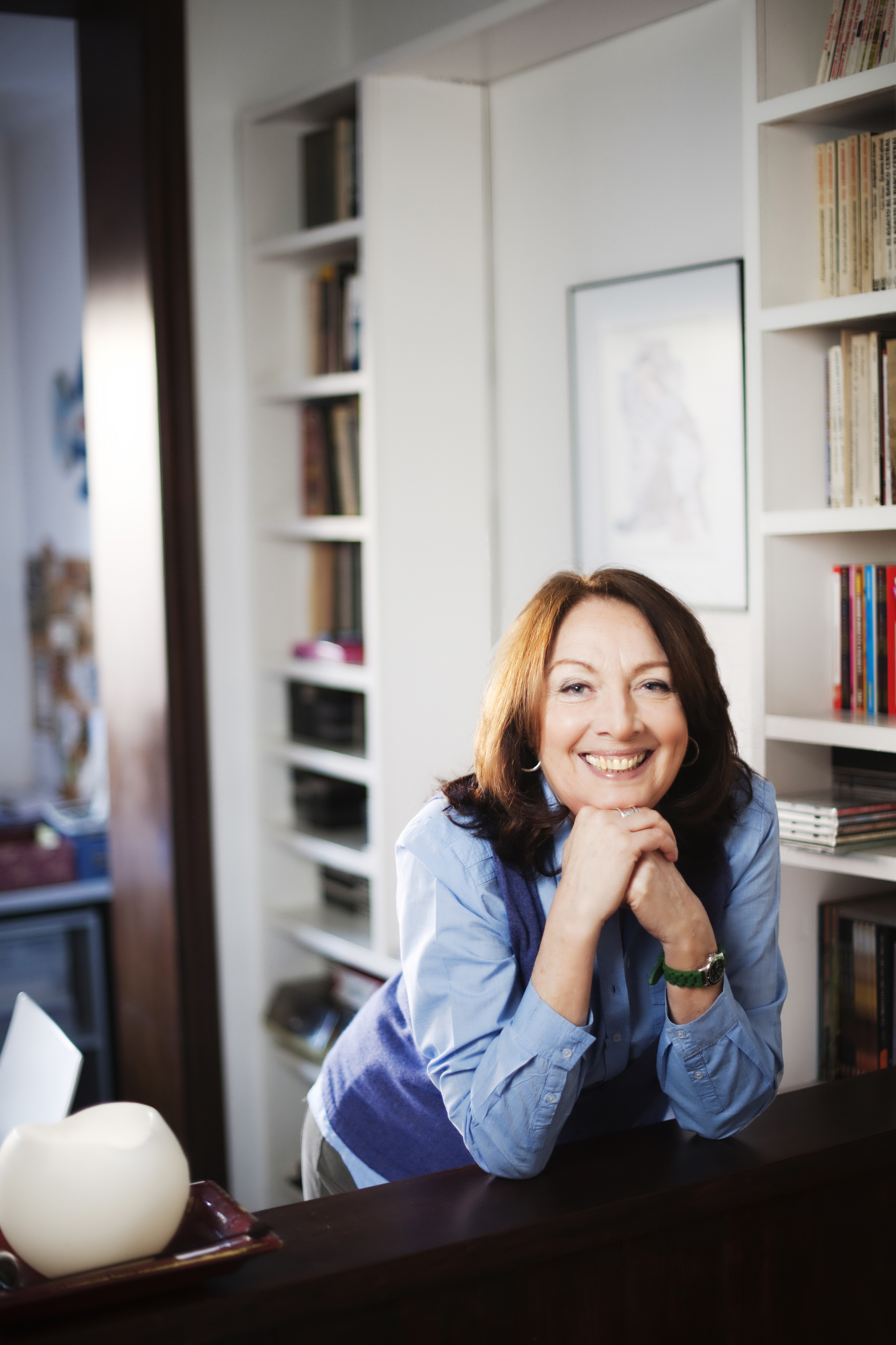 Foto de la escritora Alicia Gallotti